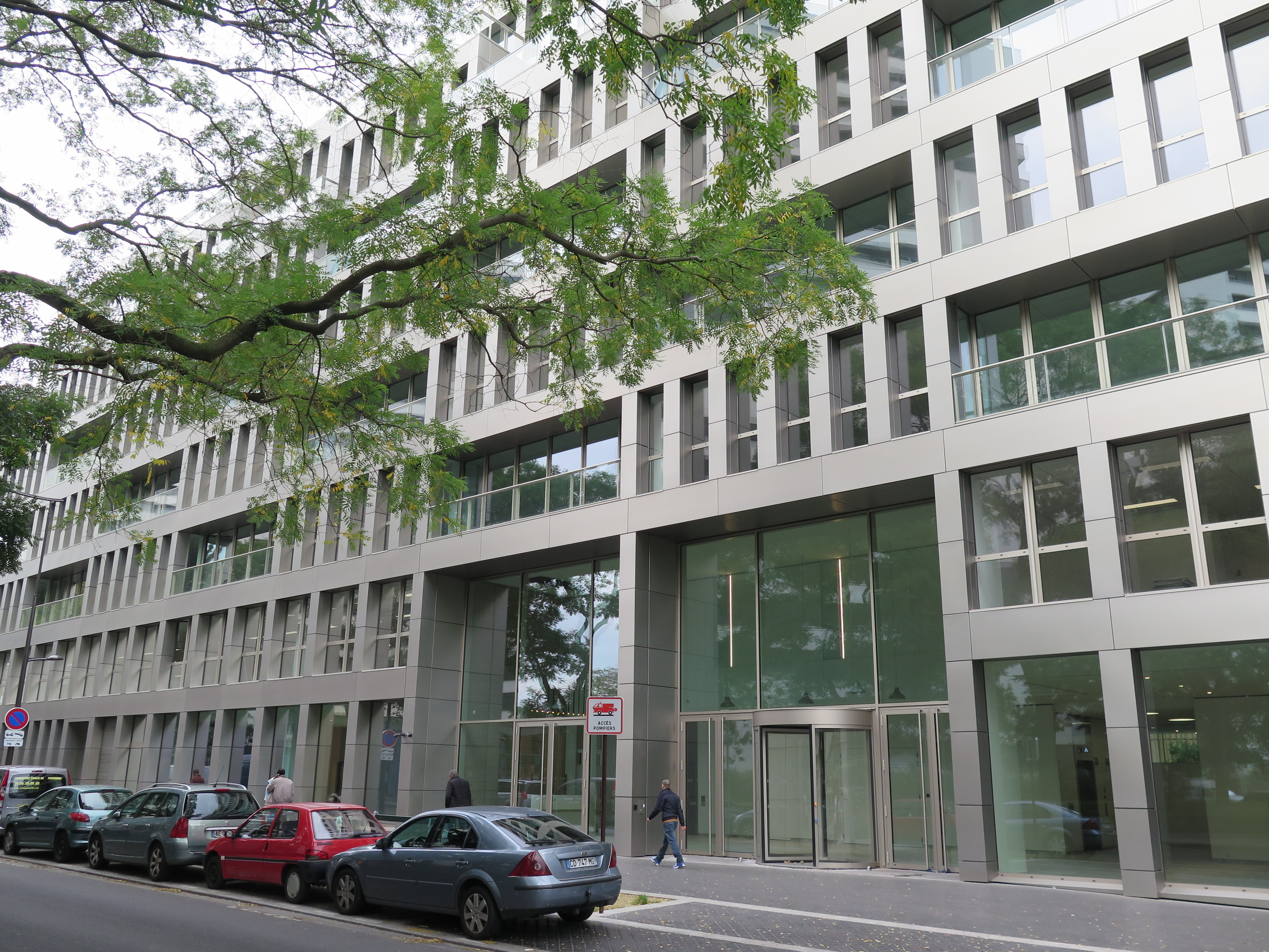 Tempo extérieurs